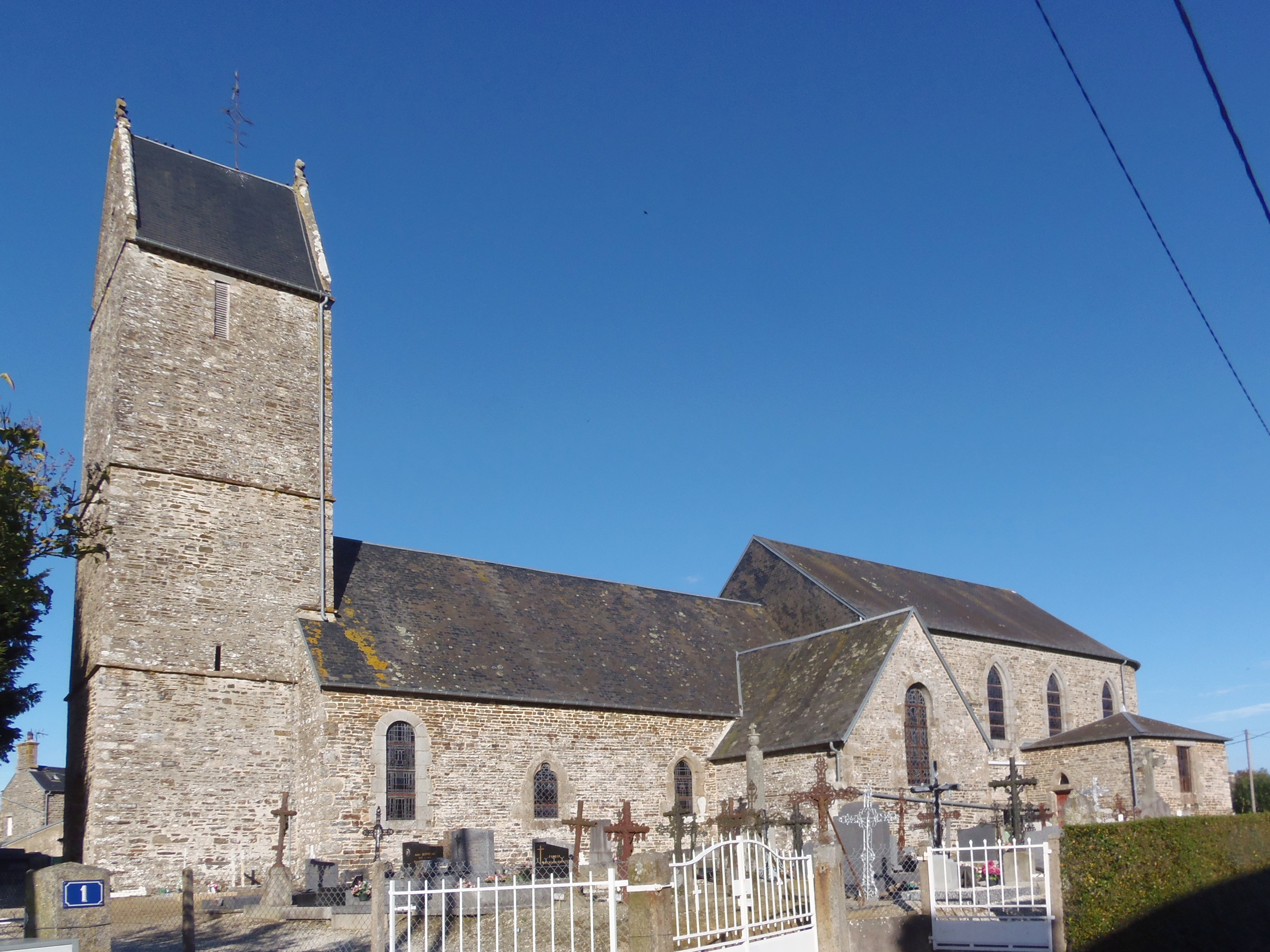 Viessoix (Normandie, France). L'église Saint-André.